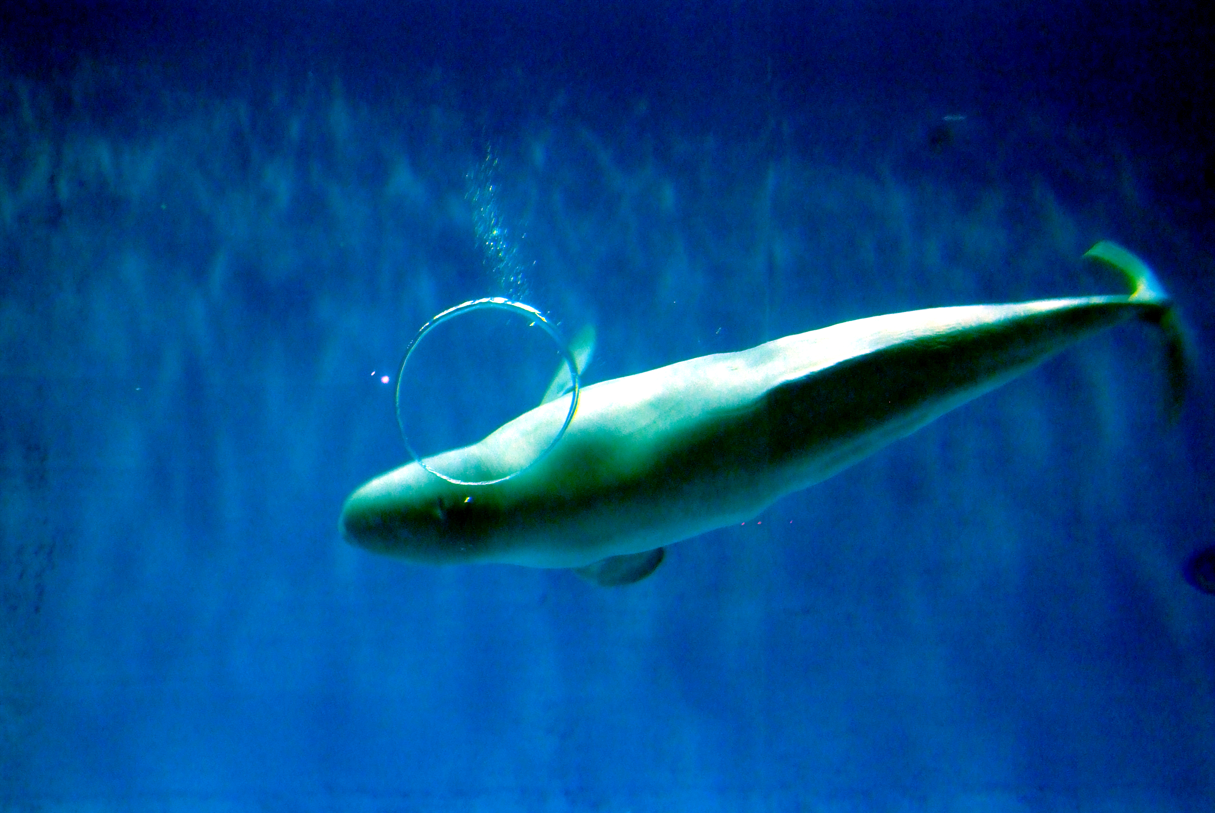 しまね海洋館アクアス ニューバブルリング 『マジックリング』